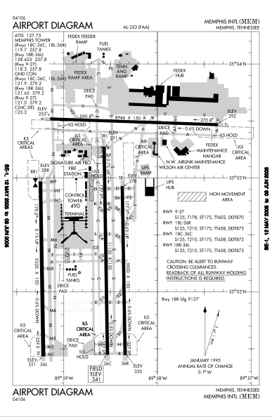 Memphisin kansainvälinen lentoasema.